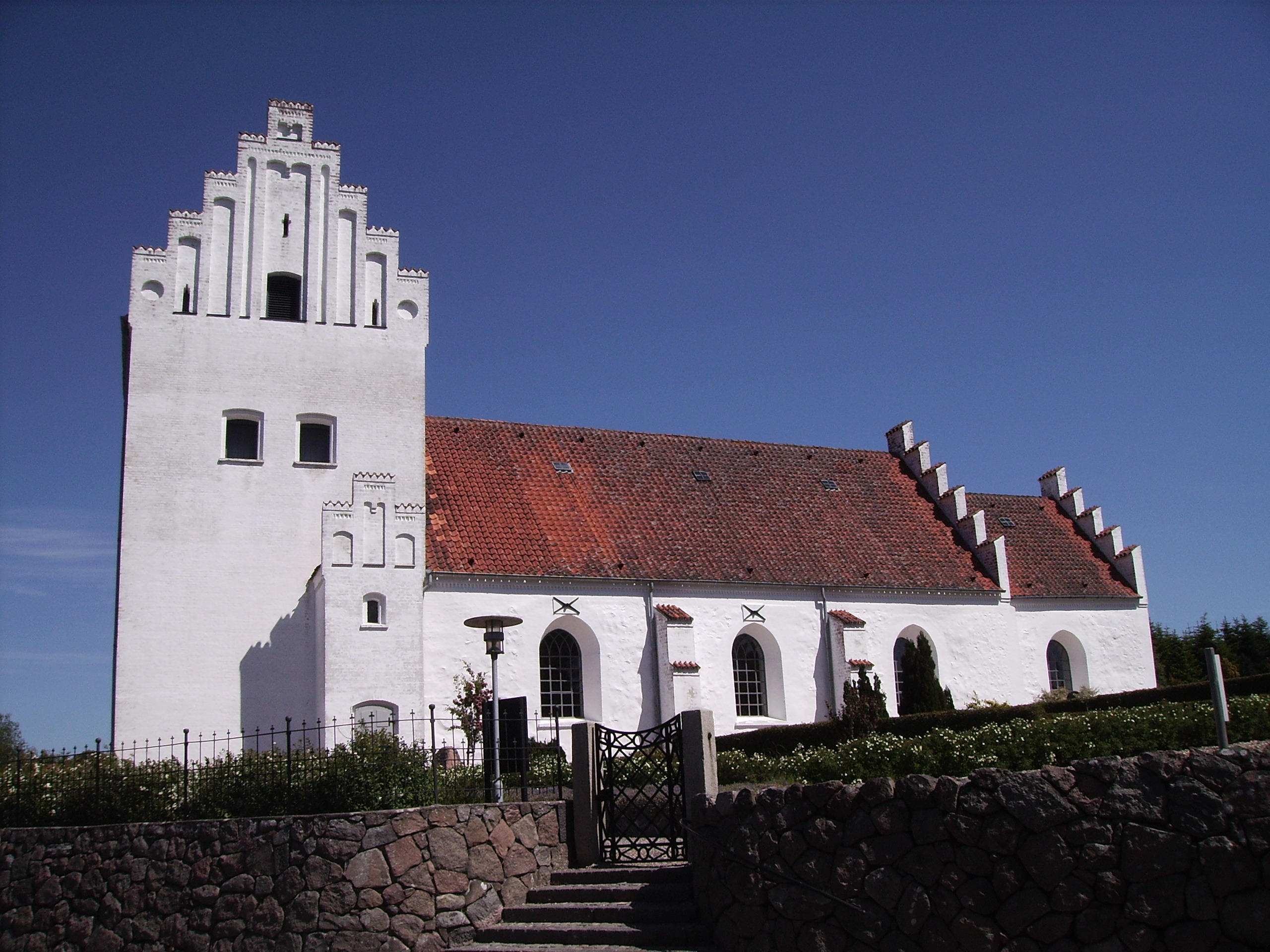 Jordløse Kirke, Jordløse Sogn, Sallinge Herred, Svendborg Amt, Denmark (Danish Church) - Jordløse Kirke fra syd